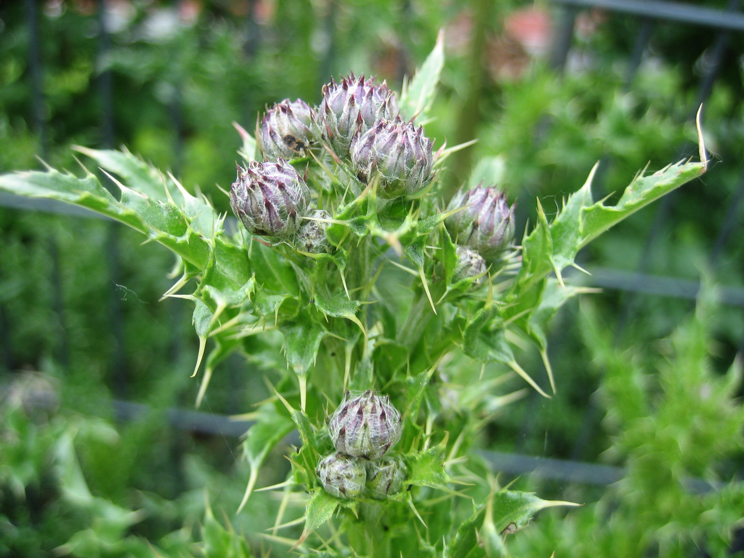 Cirsium arvense Distelknospen, im Spätfrühling Autor(en): Rita Erfurt Bildbeschreibung: Distelknospen, im Spätfrühling Mögliche Artikelverwendung: Disteln